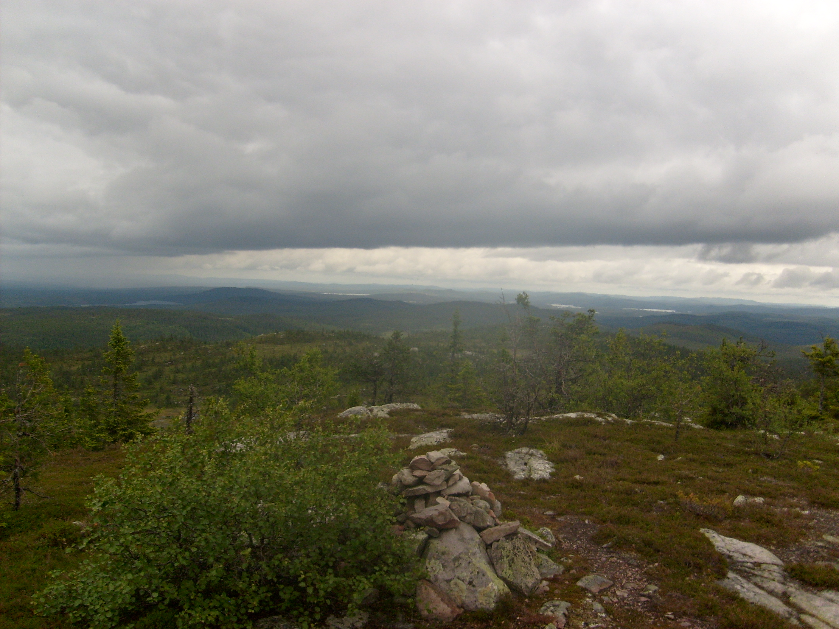 Storvardens topp i Tandövala naturreservat